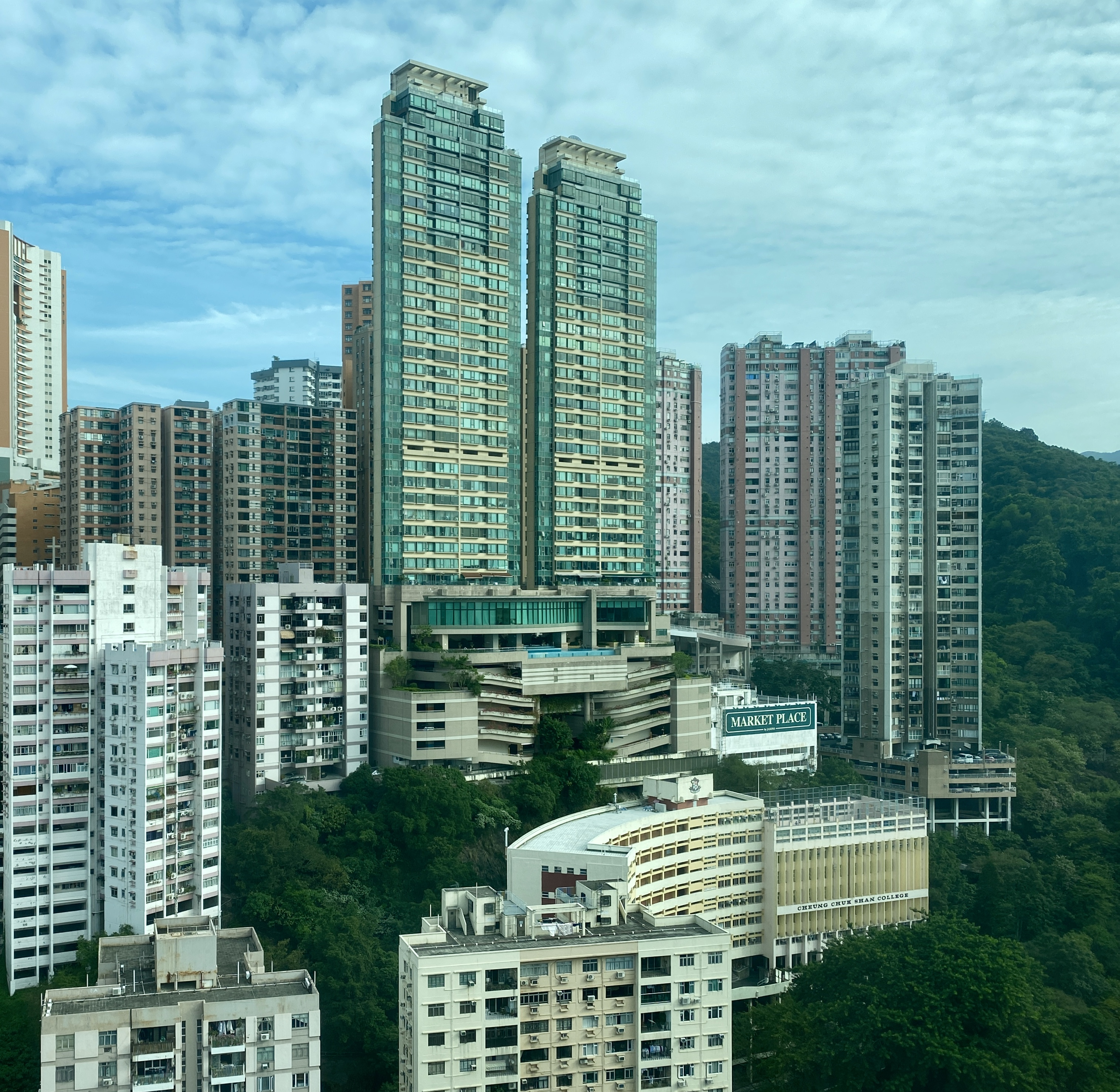 雲景道豪宅海天峰